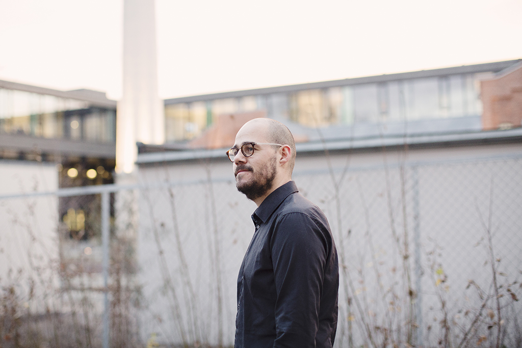 Lasse W. Fosshaug. Foto: Heidi Furre.